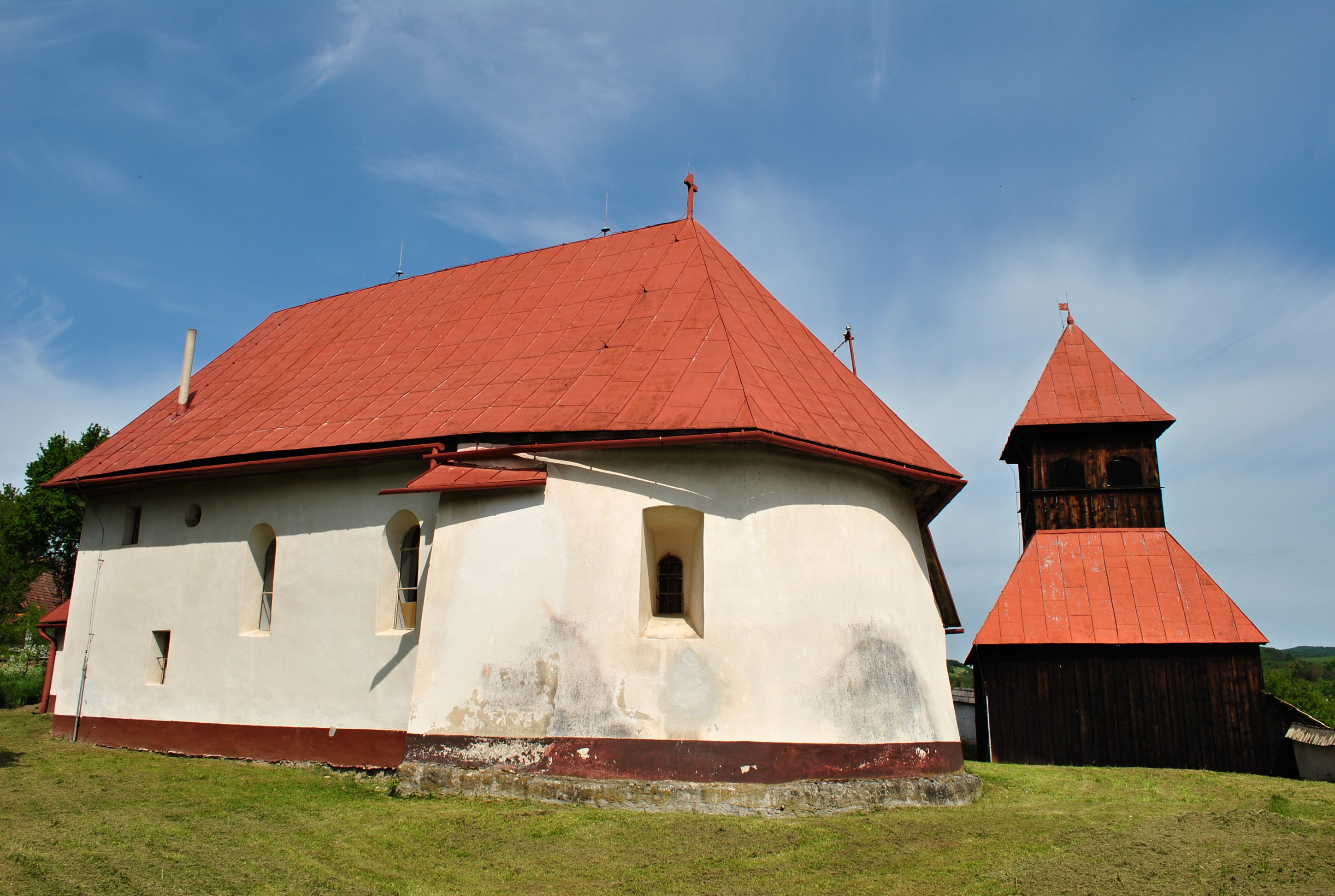 Ladzany, okr. Krupina - evanjelický kostol - stav v máji 2015